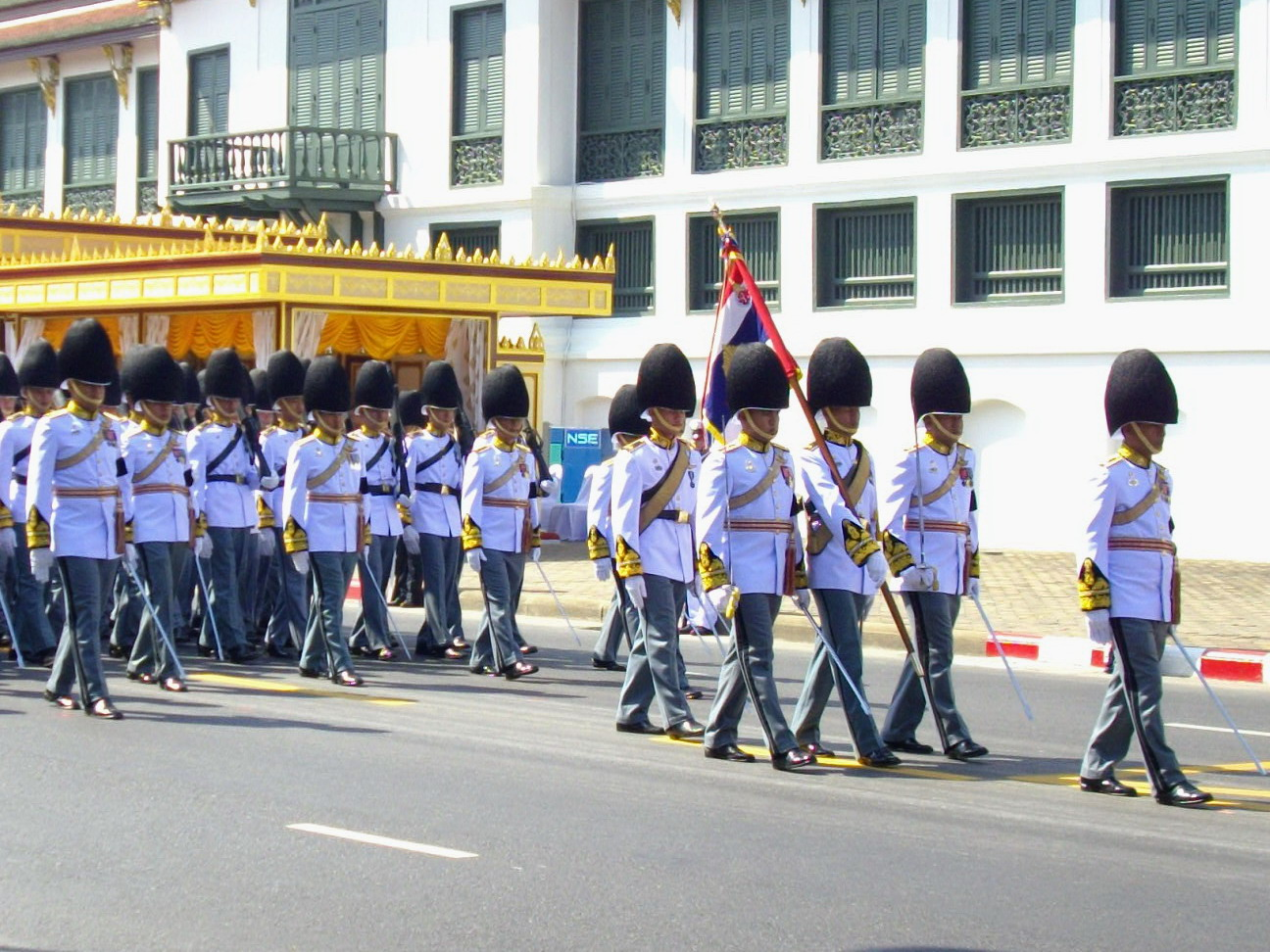 แถวทหารรักษาพระองค์จากกองพันทหาช่างที่ 1 รักษาพระองค์ ในริ้วกระบวนเชิญพระศพสมเด็จพระเจ้าพี่นางเธอ เจ้าฟ้ากัลยานิวัฒนา กรมหลวงนราธิวาสราชนครินทร์ ริ้วกระบวนที่ 2 หน้าพระที่นั่งสุทไธสวรรยปราสาท ถนนสนามไชย วันที่ 15 พฤศจิกายน พ.ศ. 2551